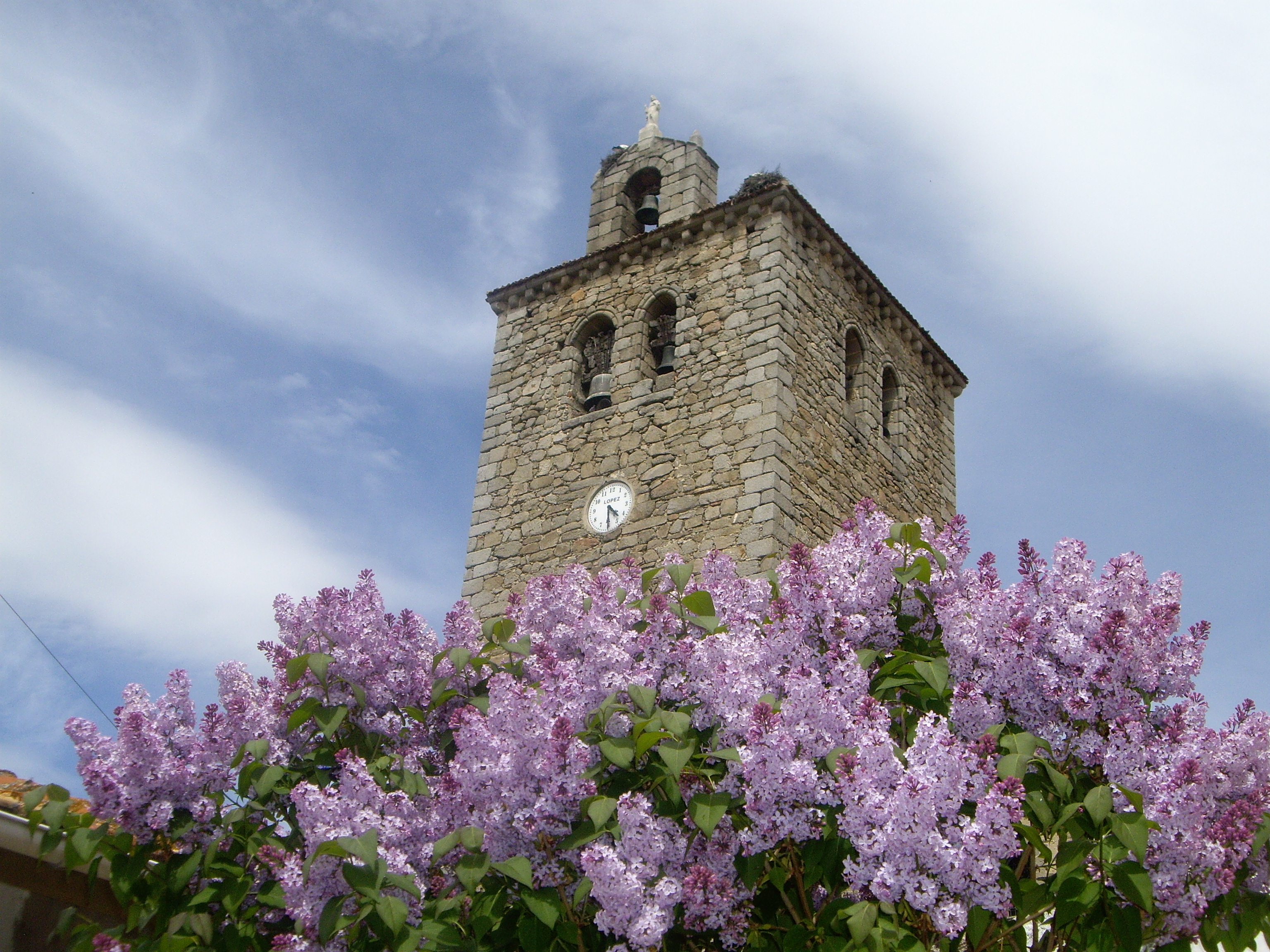 Iglesia de San Nicolas de Bari en Navas de San Antonio